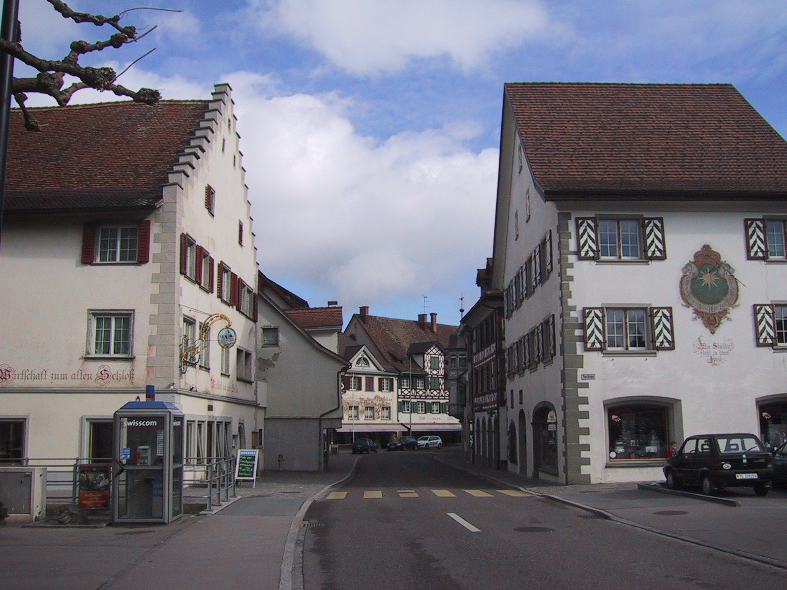 Aufnahme aus Steckborn TG: Seestrasse, westlicher Eingang zur Altstadt